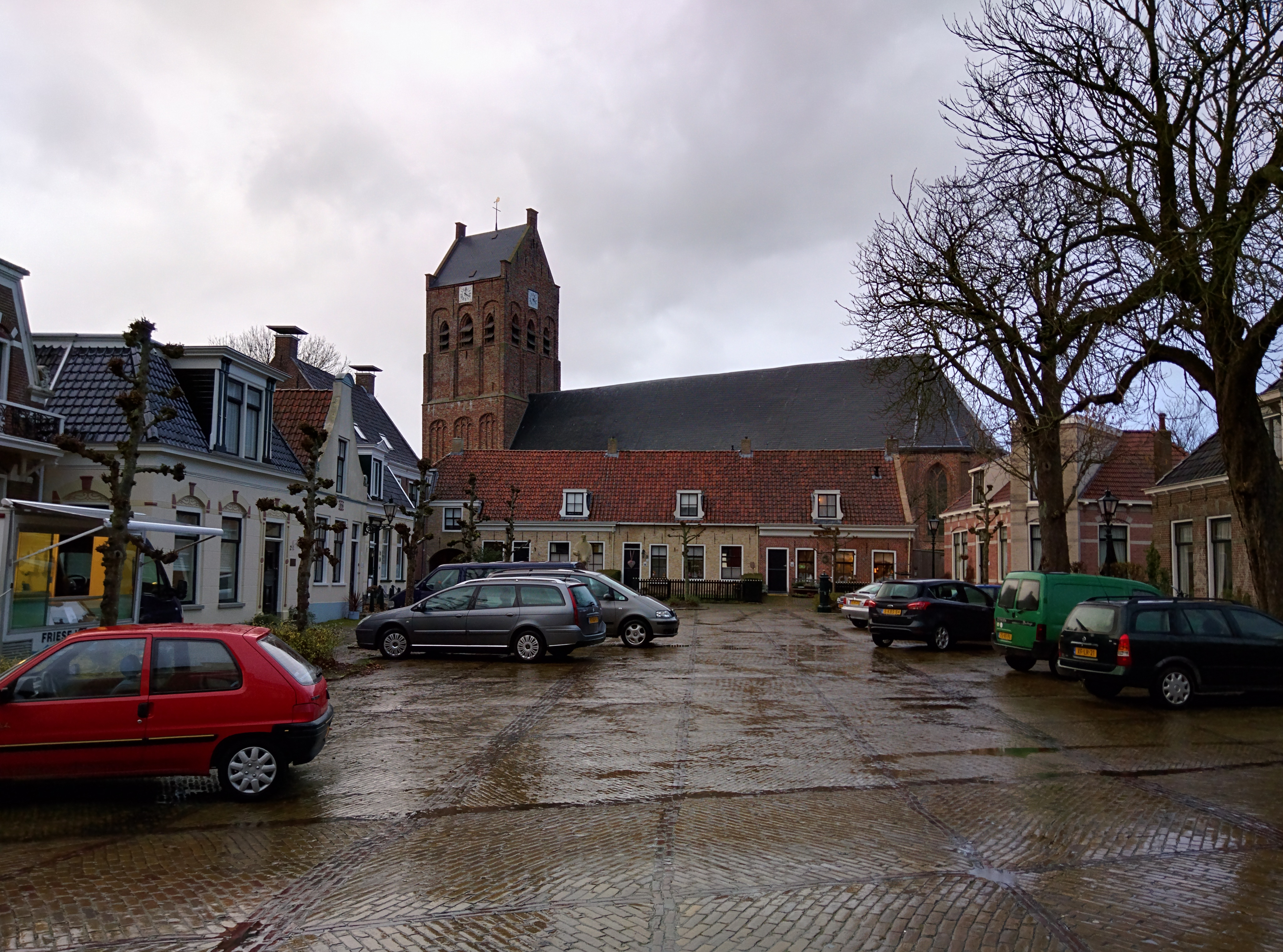 De Vrijhof, het centrale plein van Ferwert met daarachter de St. Martinuskerk.